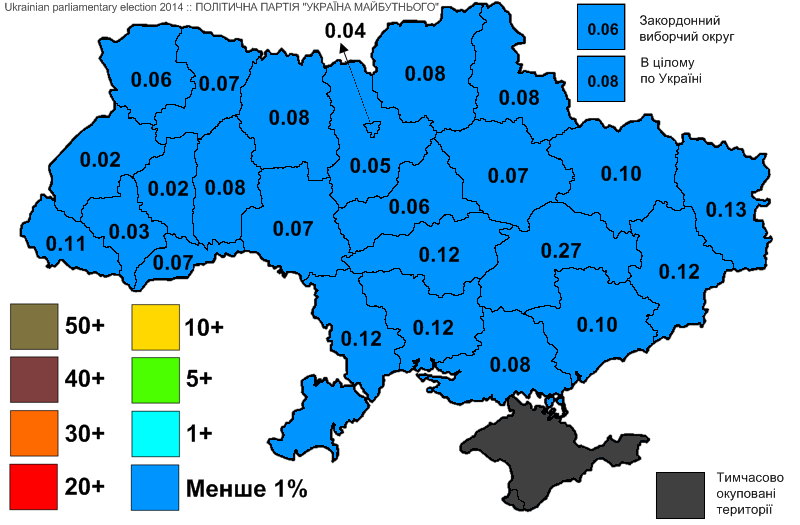 Результати виборів до Верховної Ради України, які відбулись 25 жовтня 2014 року. Інформація з офіційного сайту ЦВК. ПОЛІТИЧНА ПАРТІЯ "УКРАЇНА МАЙБУТНЬОГО".